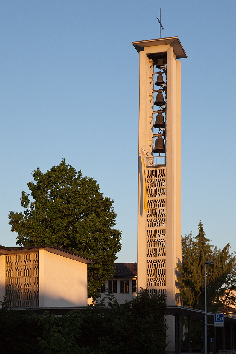 Kirchturm der katholischen Kirche in Langenthal